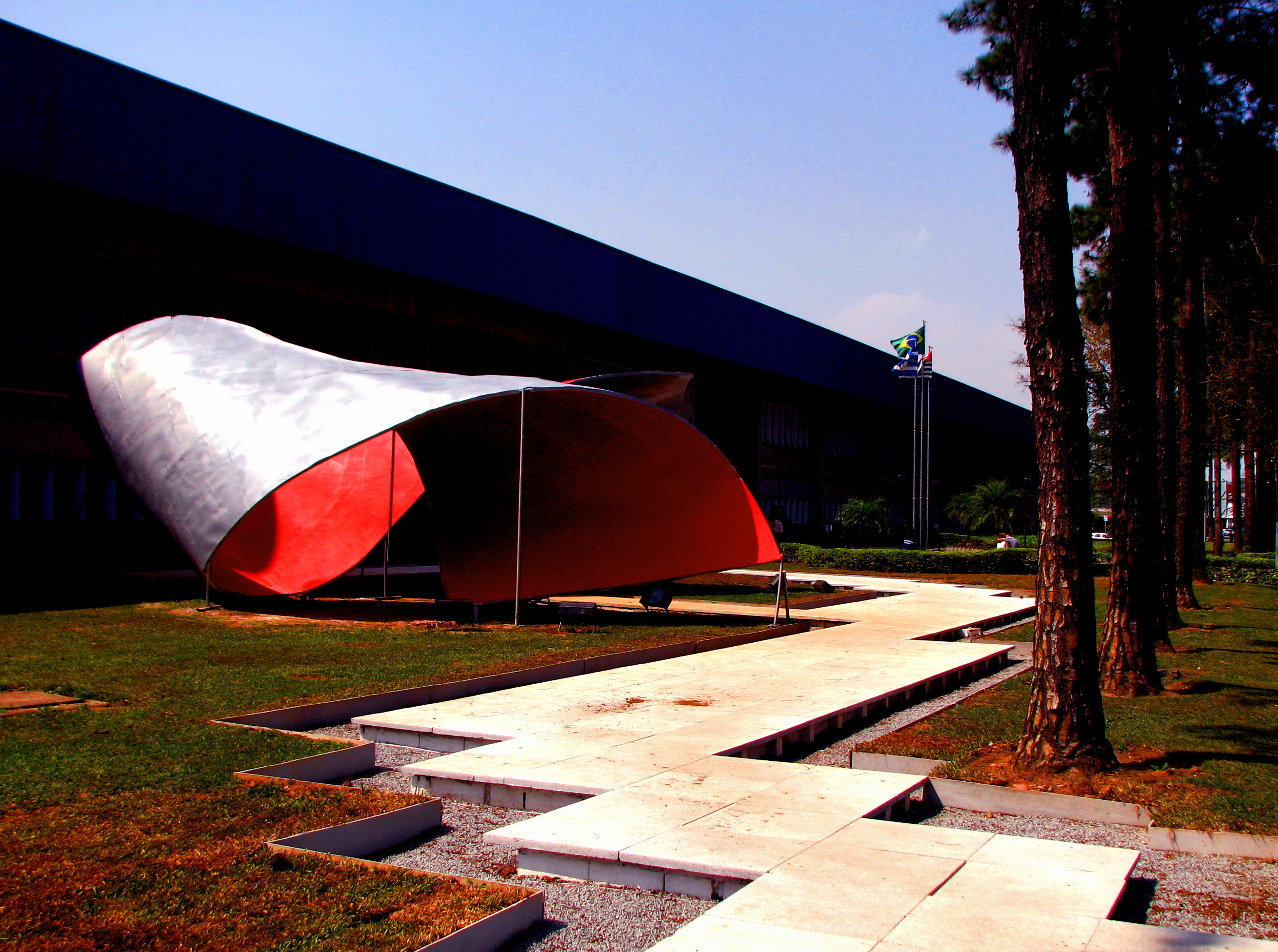 durante a construção era mais bonita...Sao Paulo/Brazil obra de tomie ohtake em frente à fea-usp